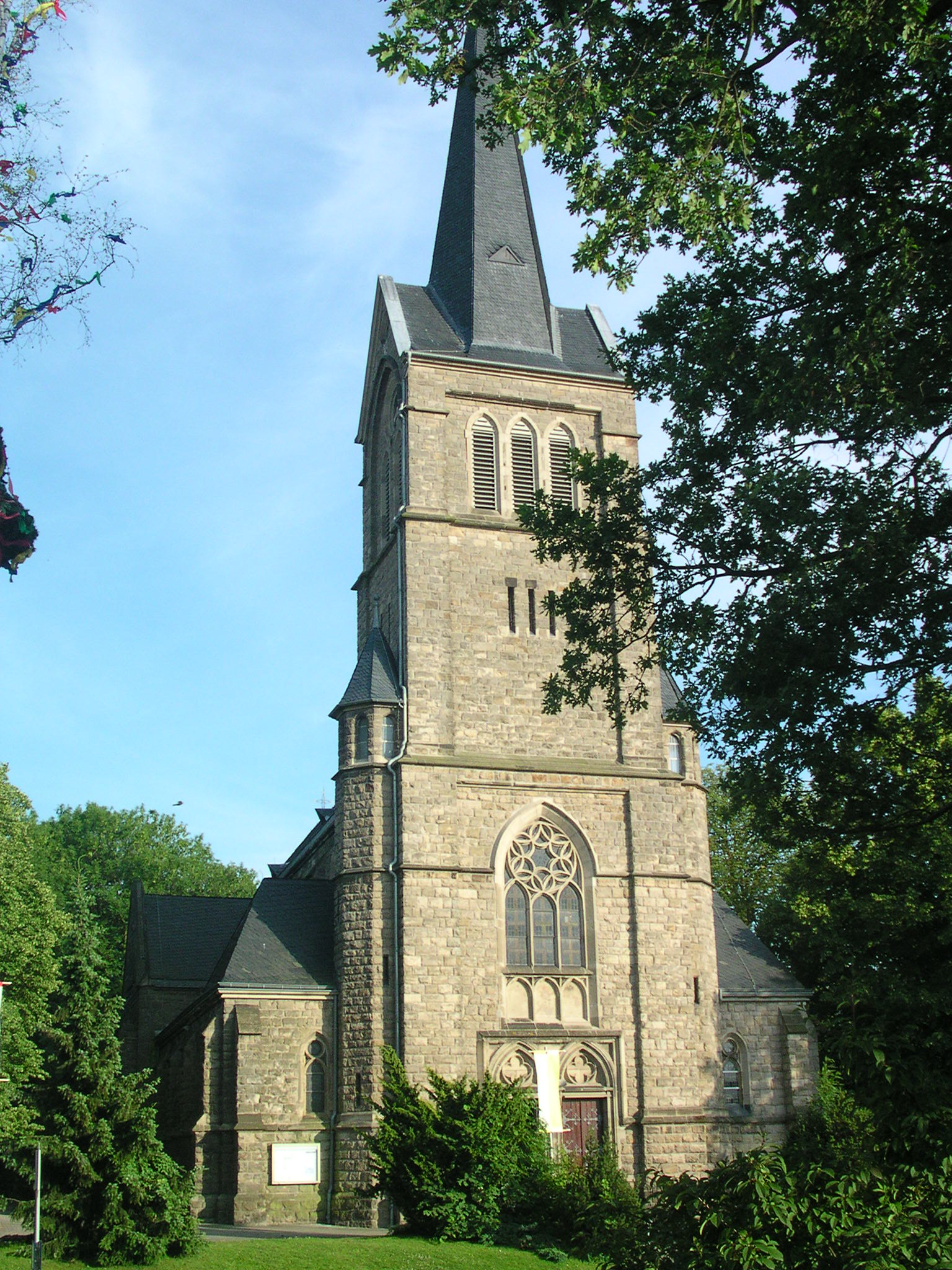 Würselen-Broichweiden, römisch-katholische Pfarrkirche St. Nikolaus